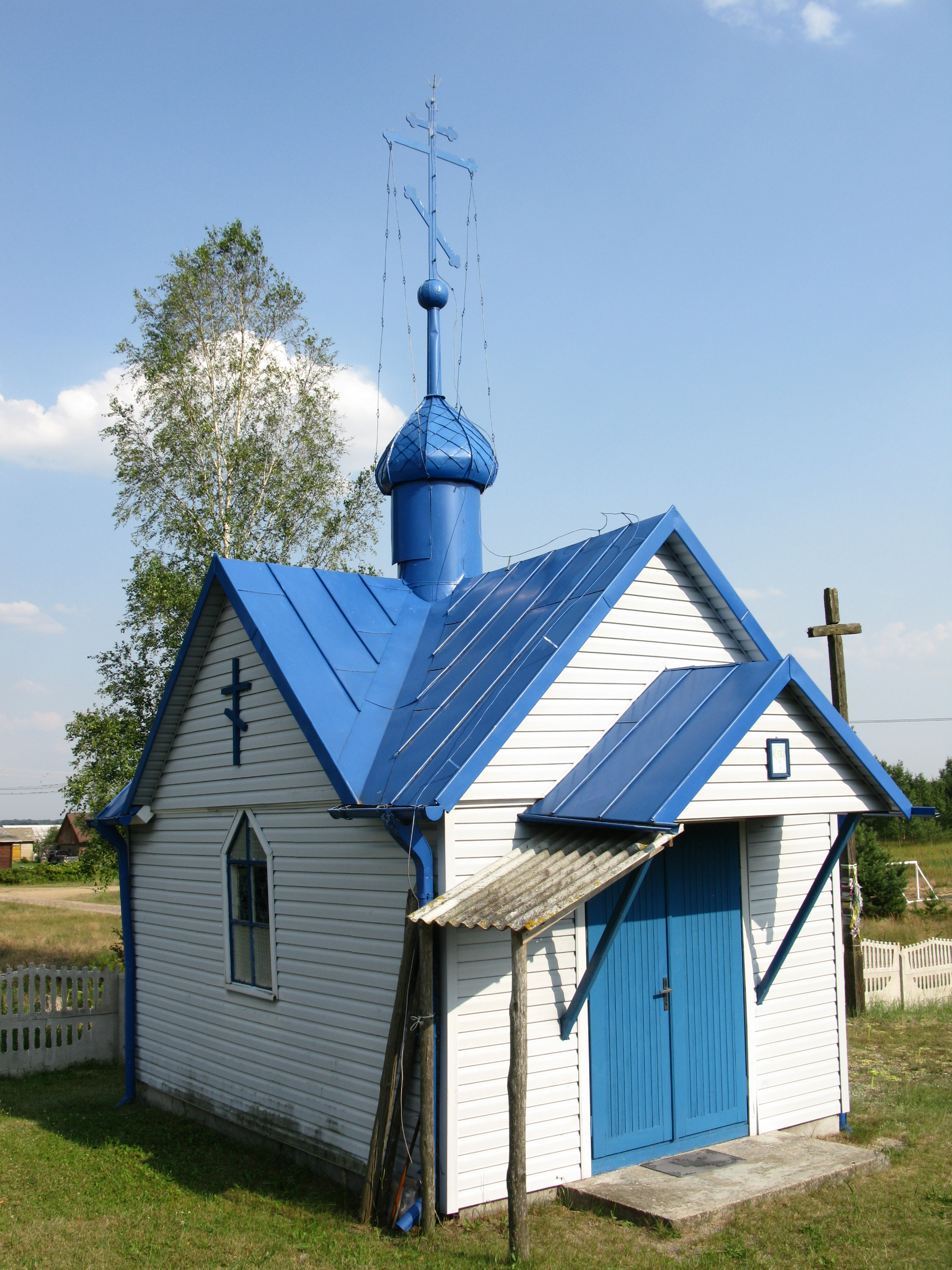 Kaplica cmentarna pw. św. Pantelejmona w Szeszyłach.